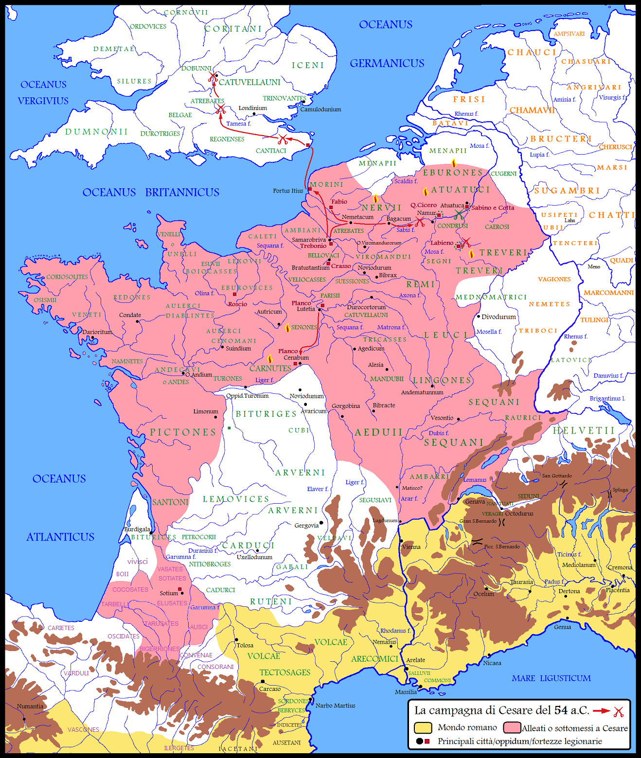 La Gallia nel corso del quinto anno di campagne militari di Cesare